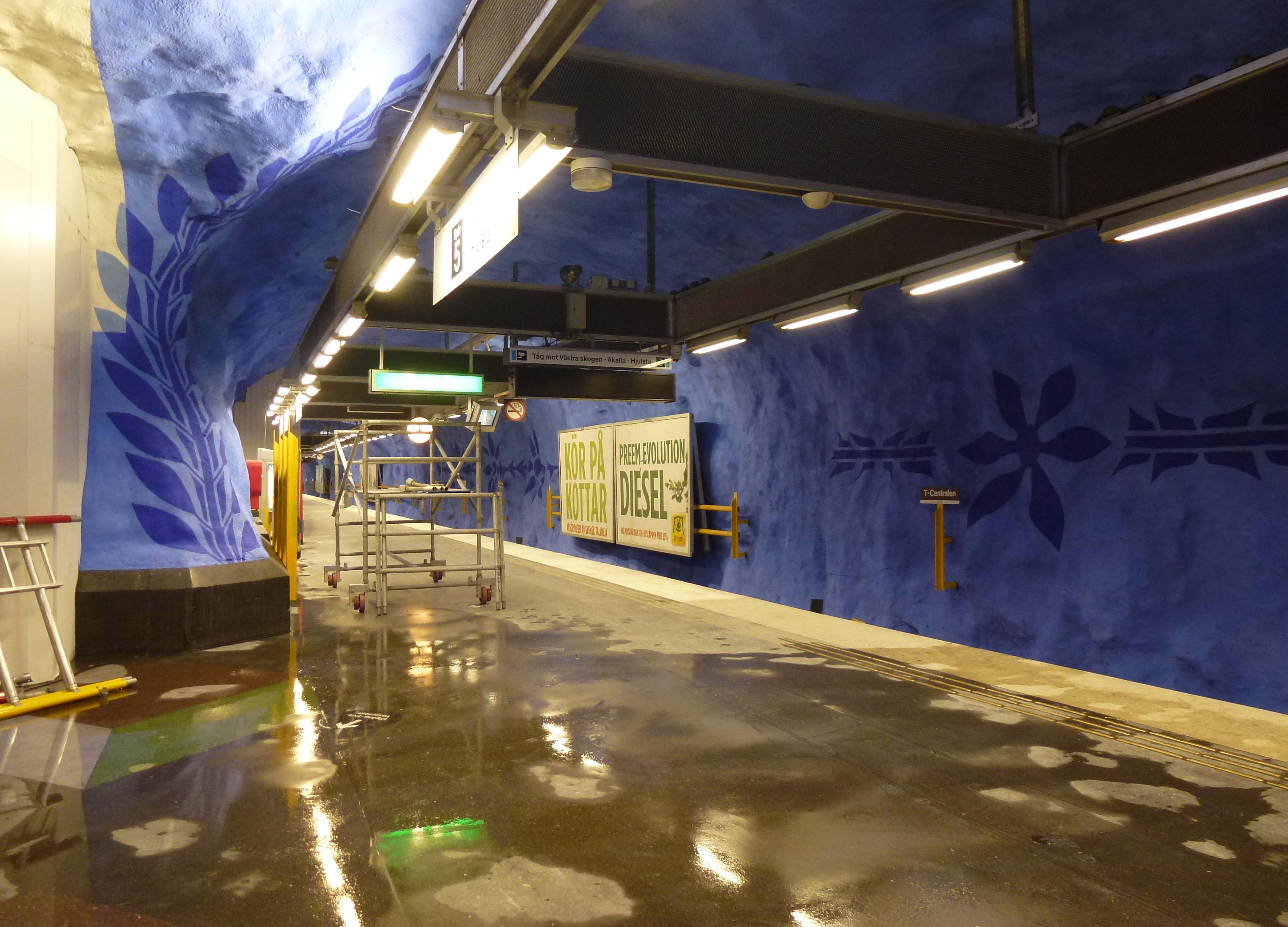 Ombgyggda perrongen för Citybanan Stockholm City Blå linje